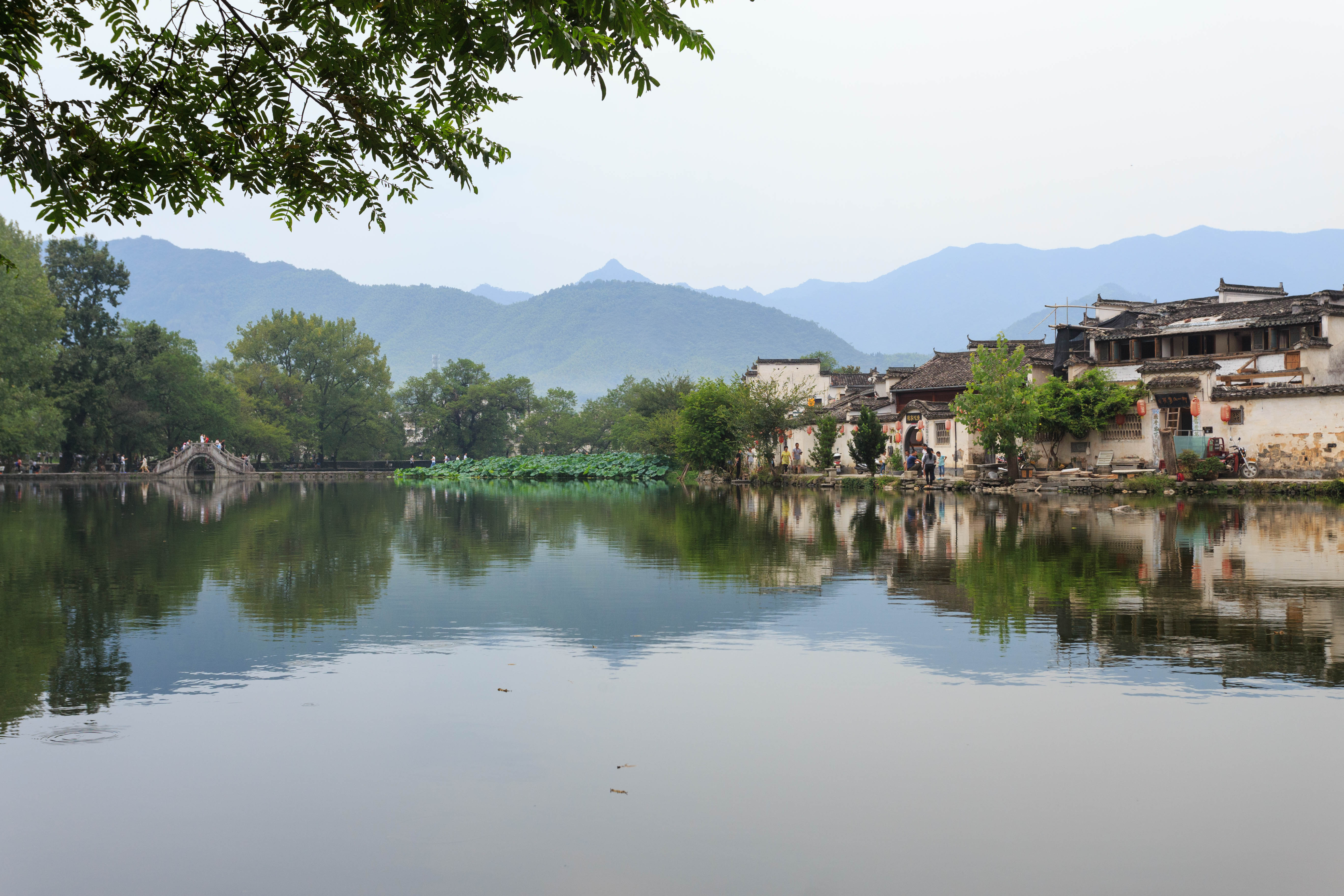 宏村南湖